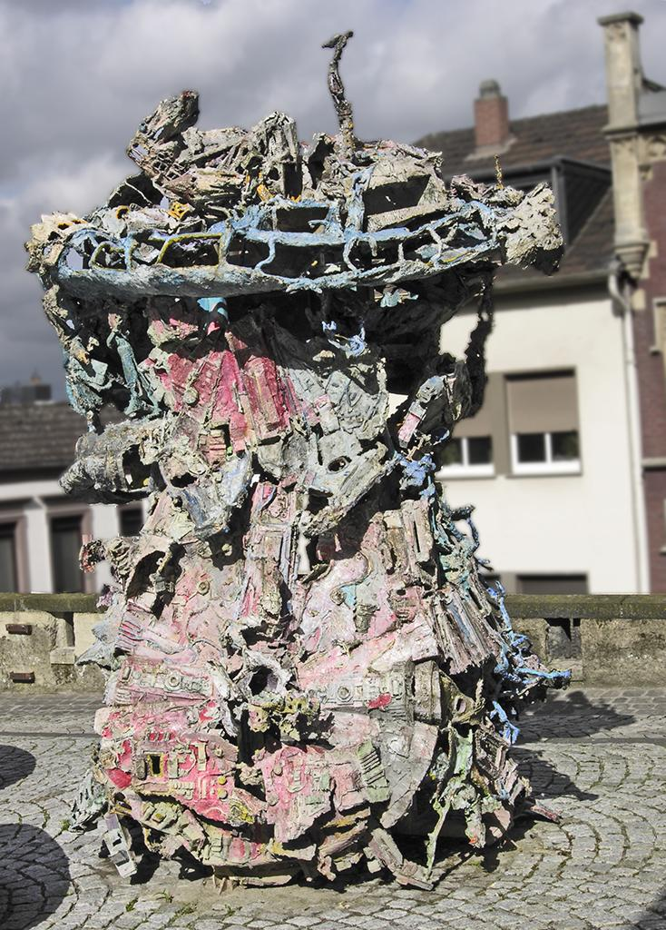 Thomas Virnich: Turm zu Babel, 2002 in Mönchengladbach/Germany Fotograf: Hans Peter Schaefer Url